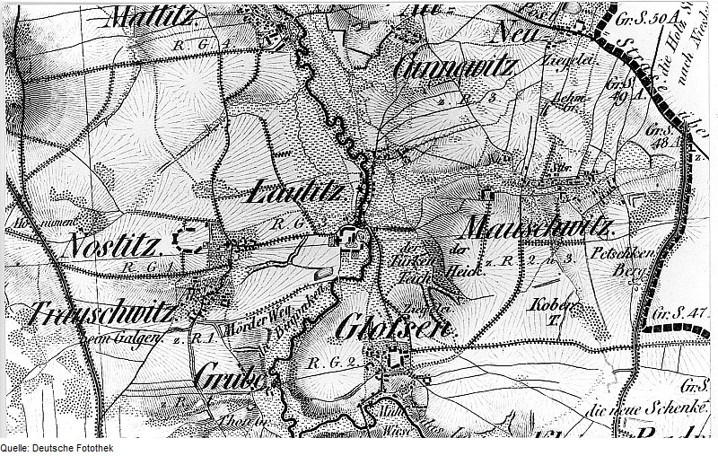 Original image description from the Deutsche Fotothek Löbau-Lautitz. Oberreit, Sect. Weißenberg, 1840